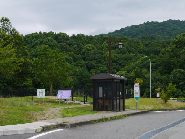 徳島自動車道上板バスストップ